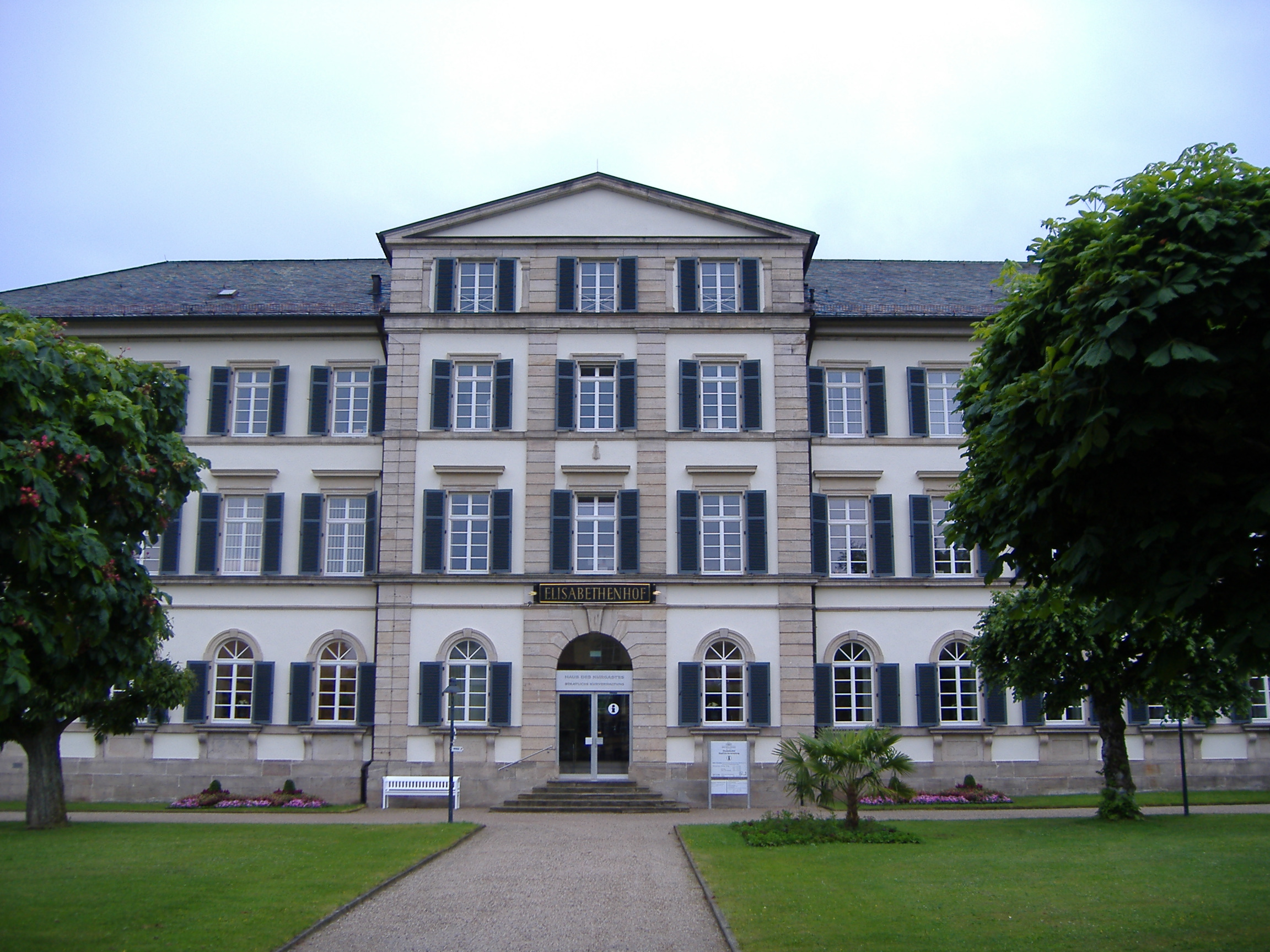 Elisabetehnhof Staatsbad Bad Brückenau